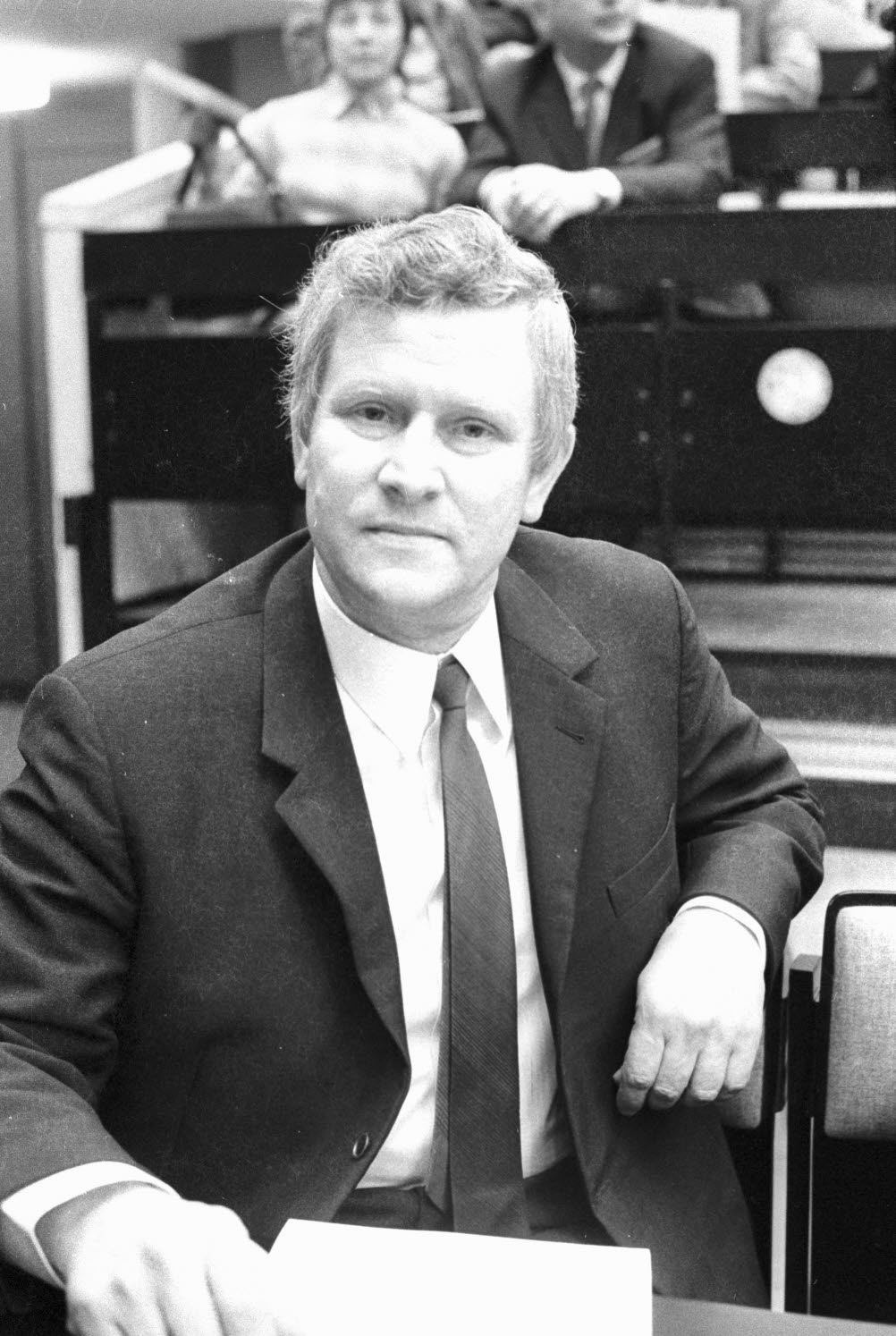 unter dem Leitthema "Skandinavien und der Ostseeraum". Referent Prof. Klaus Friedland, Historiker an der Christian-Albrechts-Universität (CAU), spricht über "Die Ostsee als Mittler von Wirtschaft und Kultur in der frühen Neuzeit".